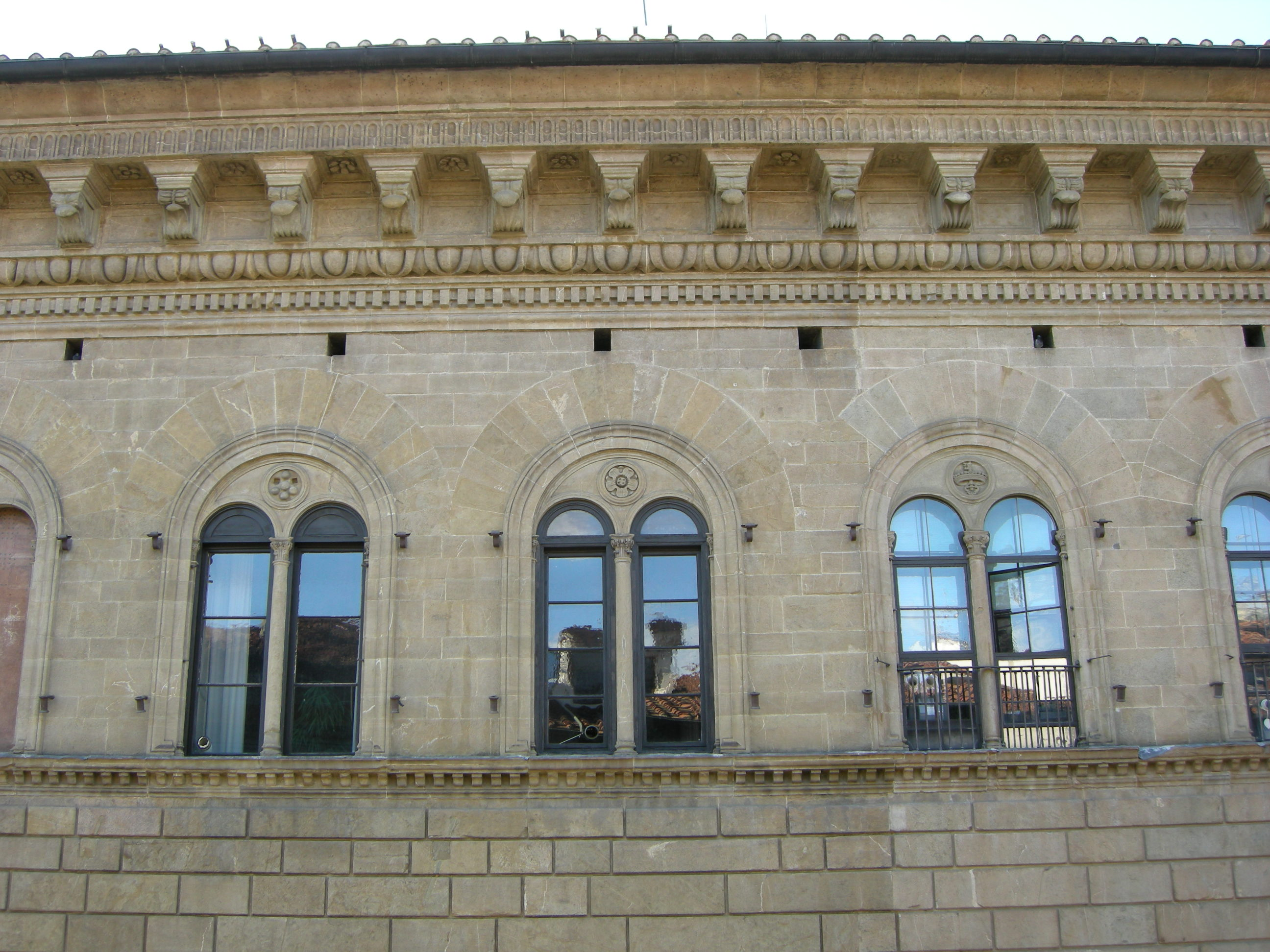 Palazzo medici riccardi, cornicione